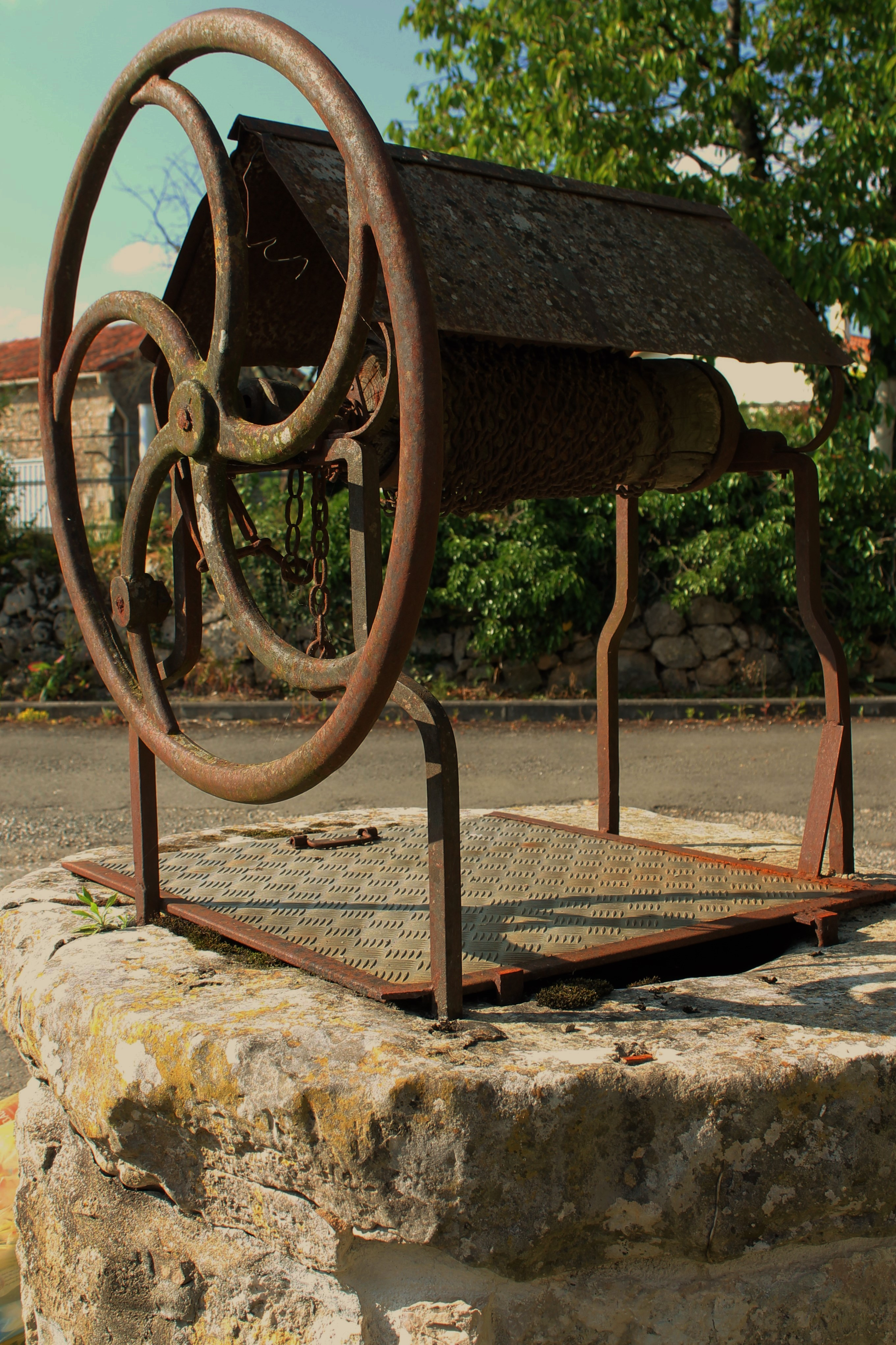 Au lieu-dit du Gazeau